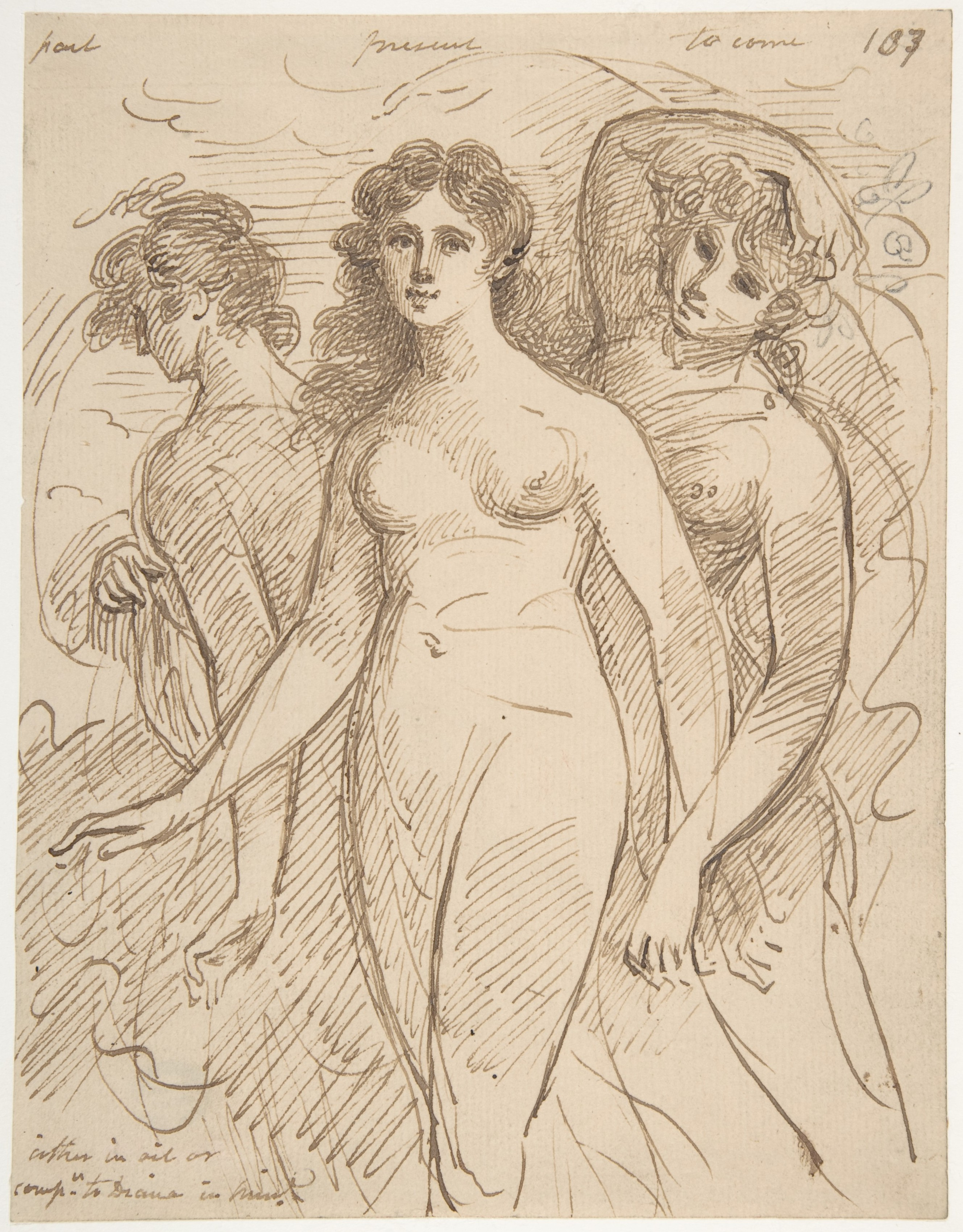 Drawing; Drawings